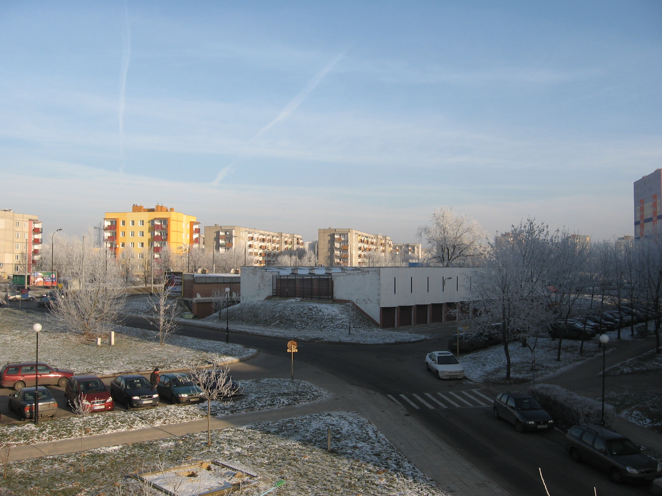 Osiedle Łęgi - jesień